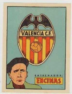 Escudo del Valencia CF